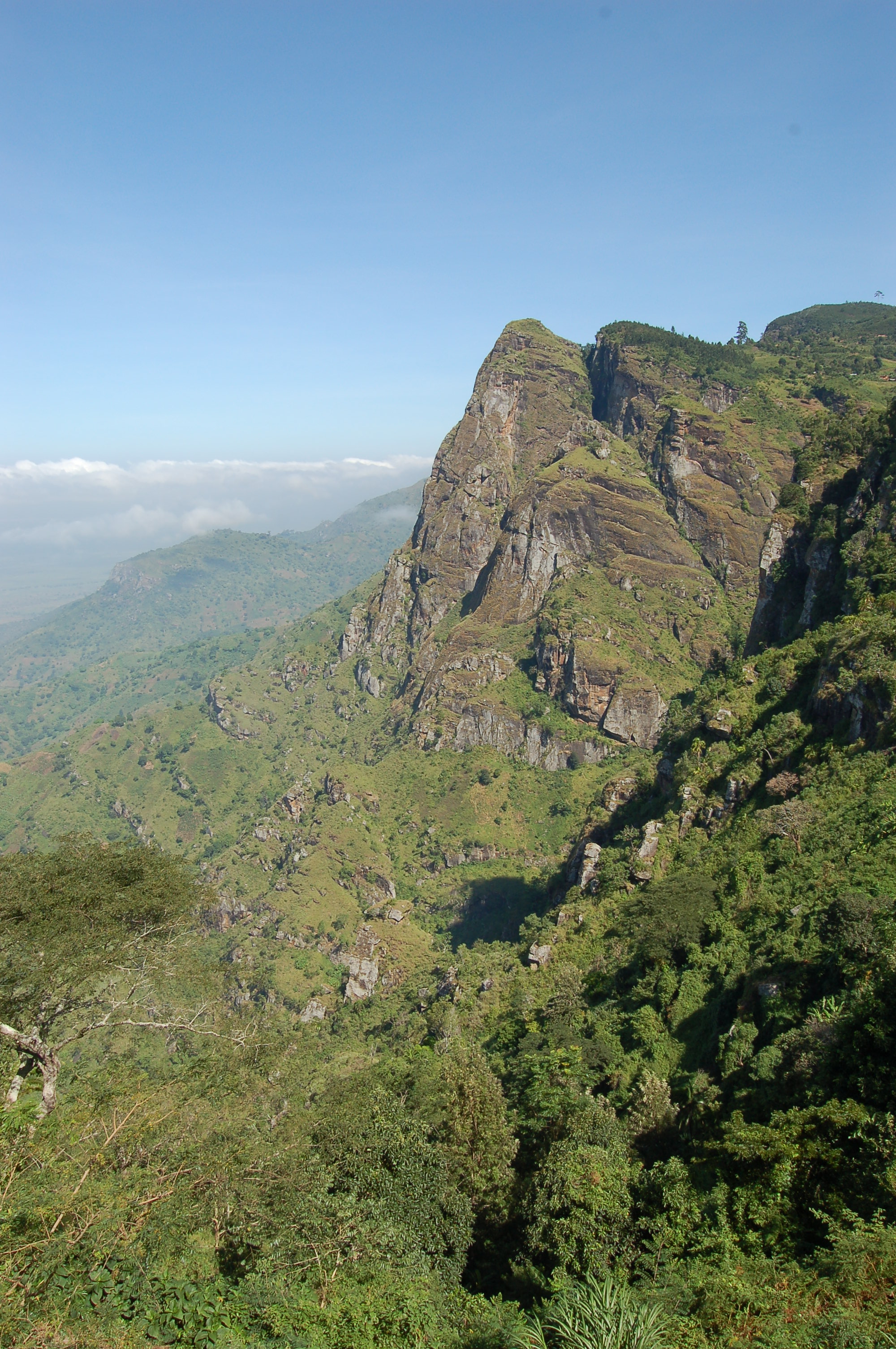 Usambara Mountains, Tanzania